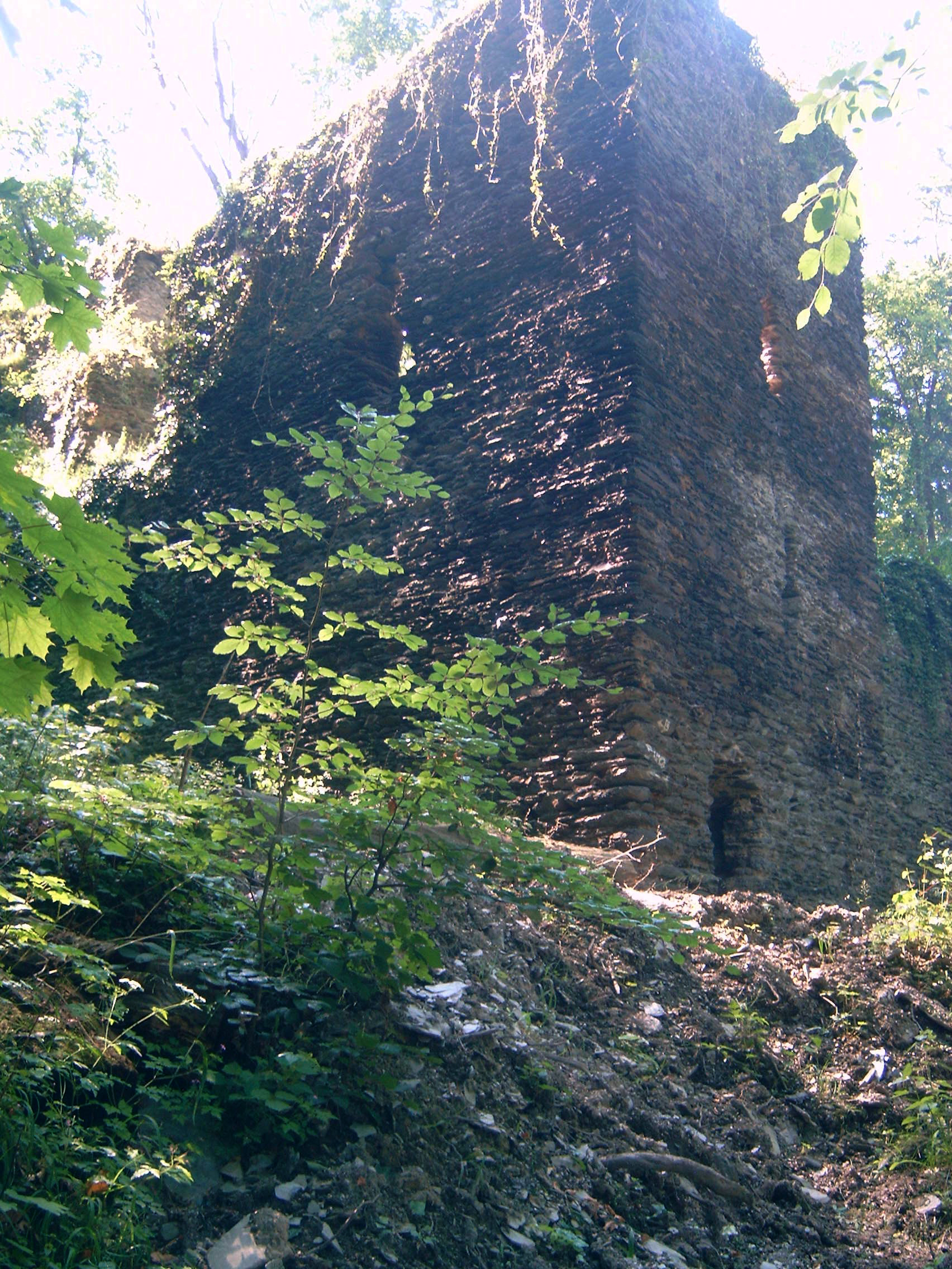 Torturm, Stein’sche Burg, Nassau, Deutschland.